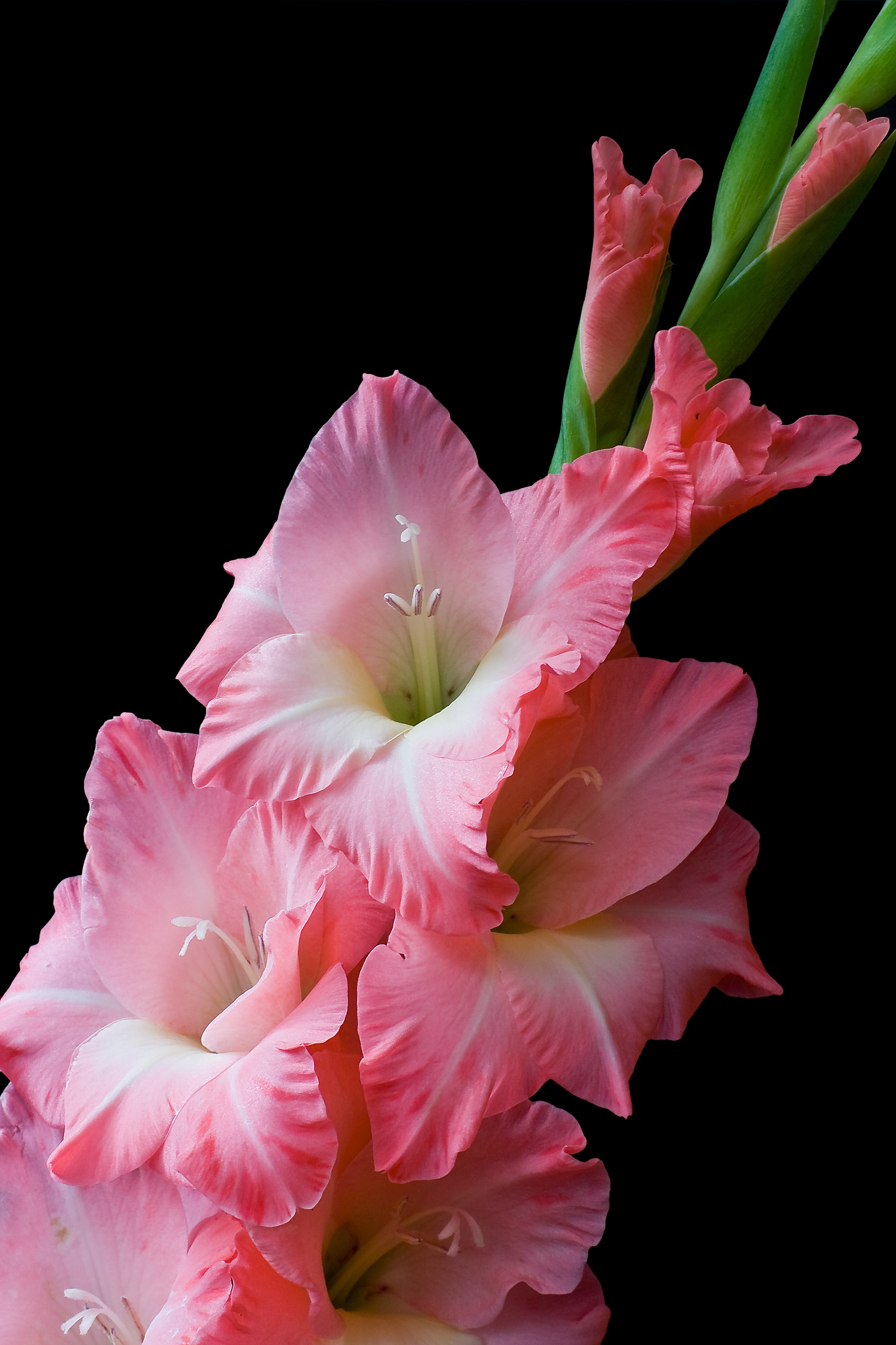 Гладиолус лиловый